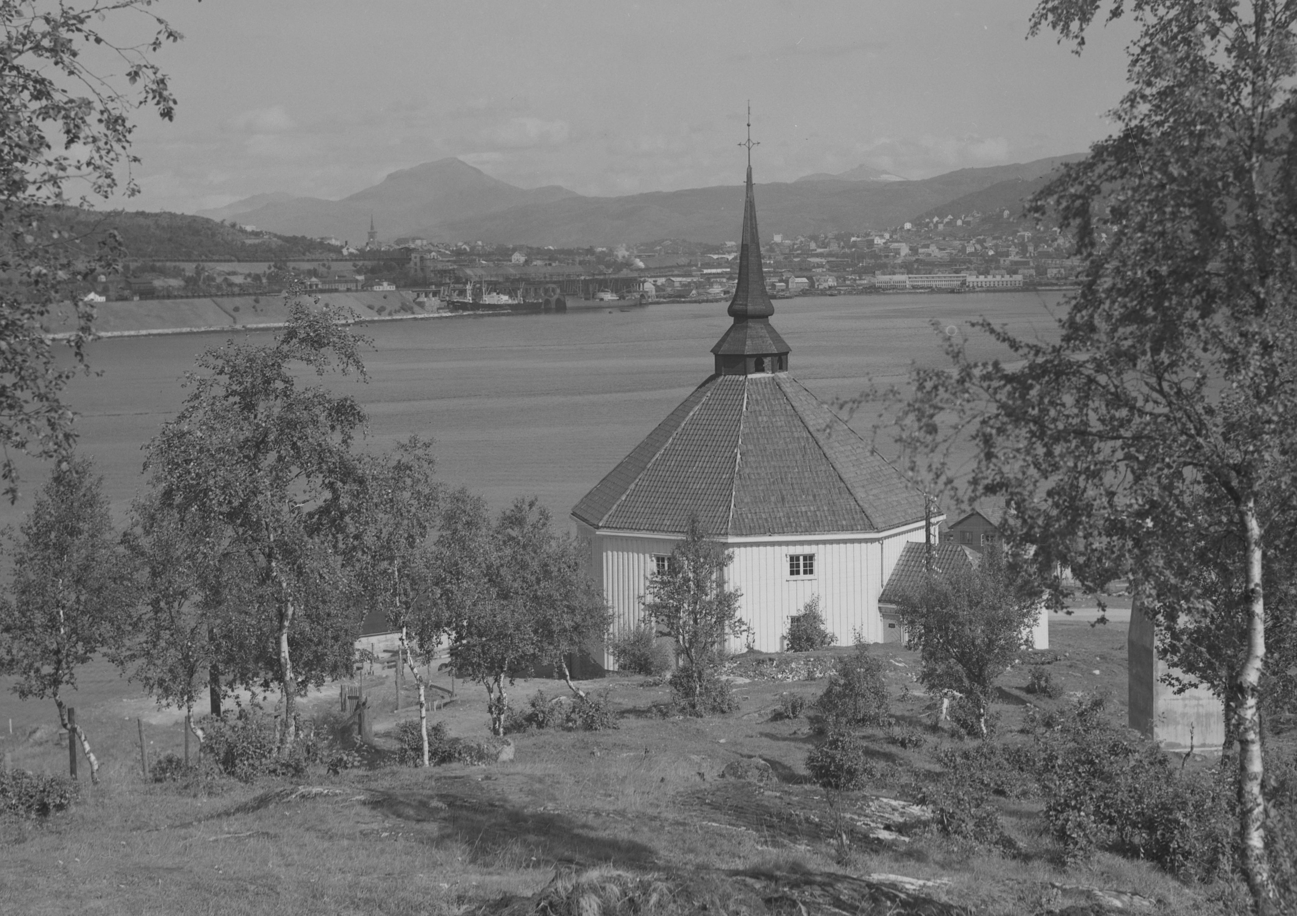 Bildet er hentet fra Nasjonalbibliotekets bildesamling. Anmerkninger til bildet var: Fotograf : ukjent